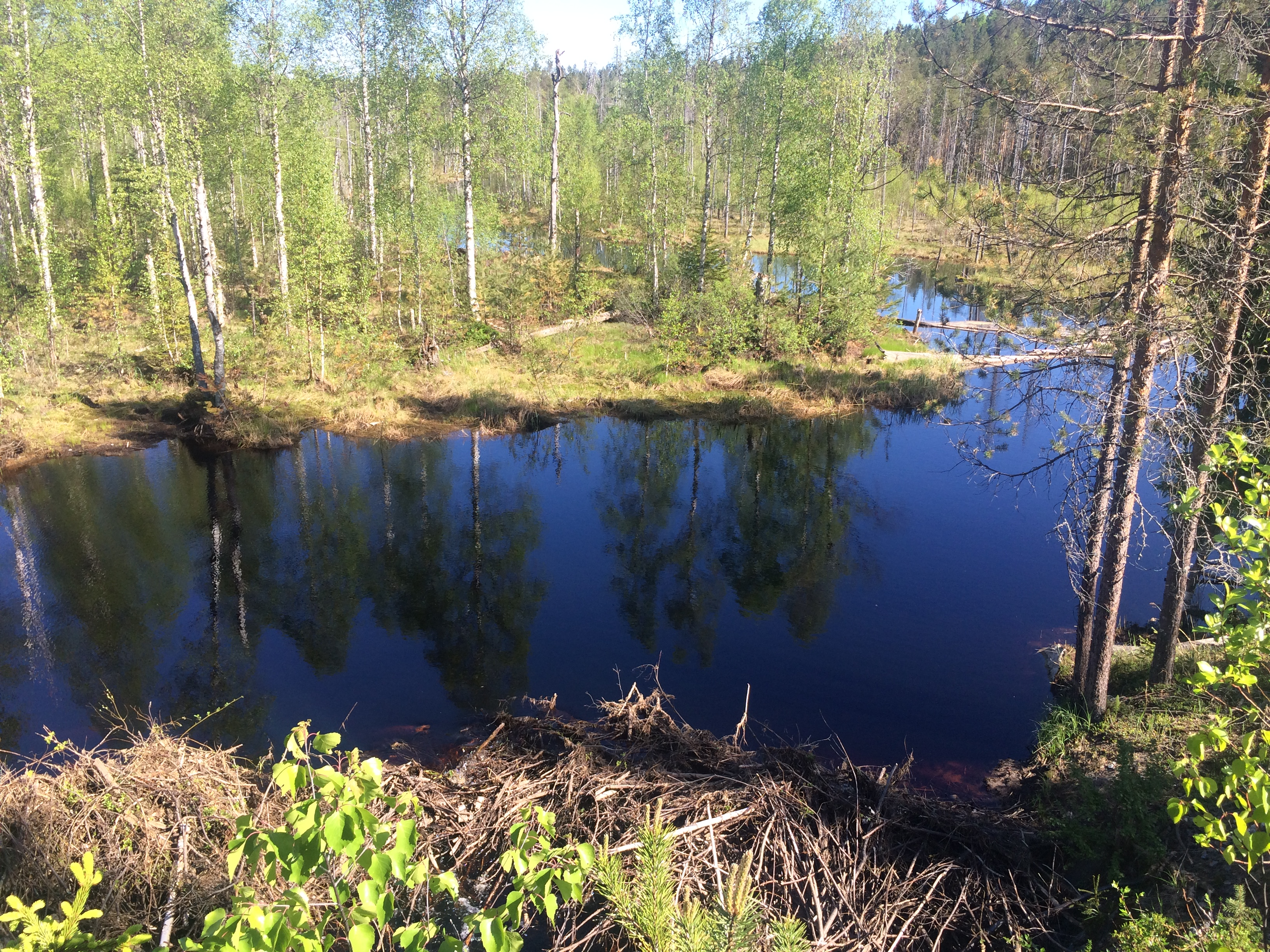 р. Каартойоки